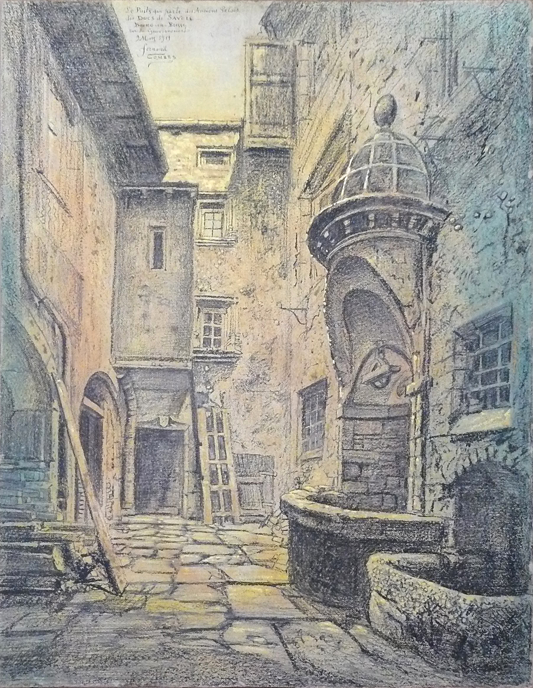 Combes F. - Charcoal, enhanced with pastel - Le Puits qui parle des Anciens Palais des Ducs de Savoie, Bourg en Bresse, rue du Gouvernement - 64,5x50cm; dessin sur carton daté du 9 mars 1919; au verso figurent plusieurs inscriptions de souvenirs de guerre de Arthur Aubry se rapportant à la 1ère guerre mondiale (14-18).